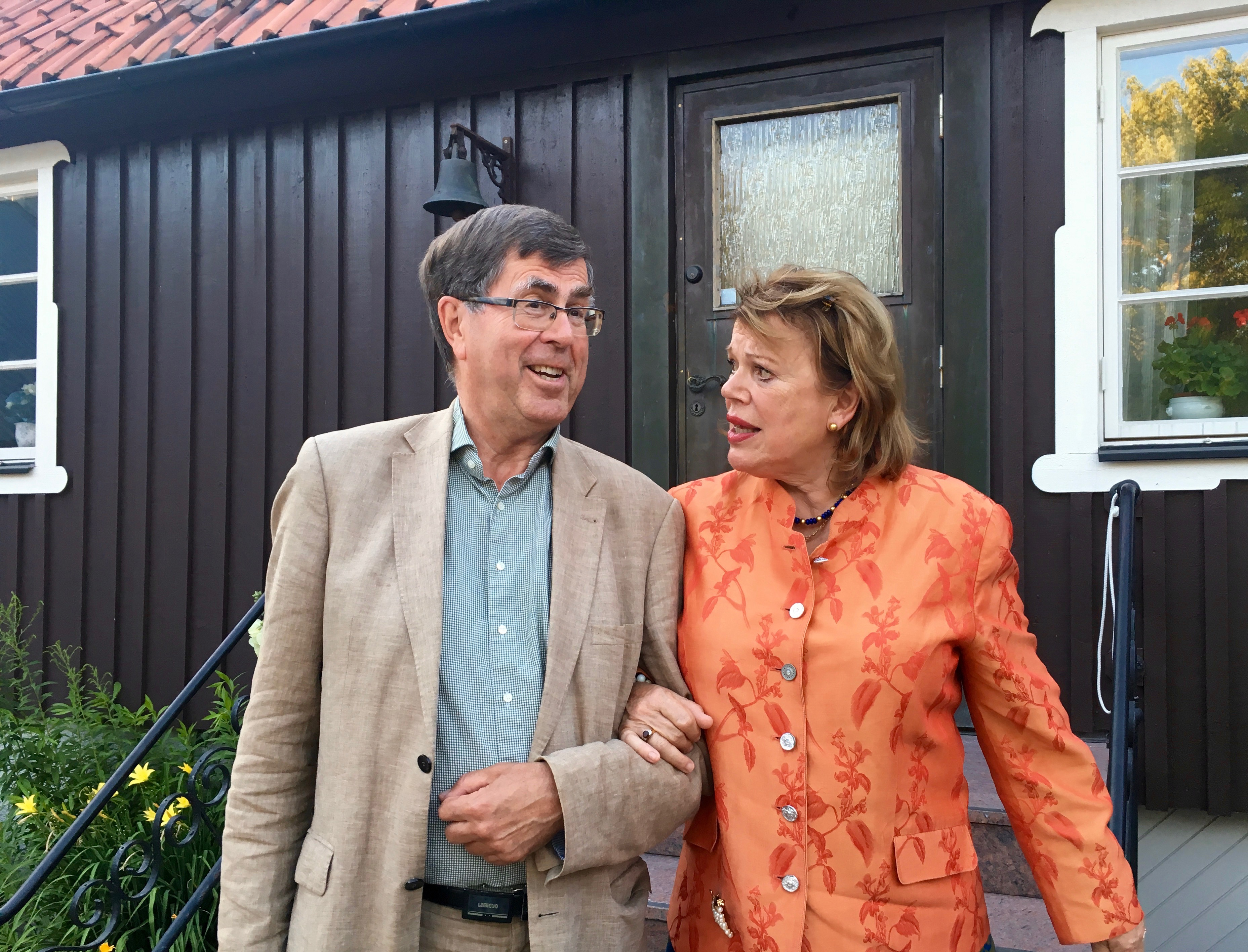 Pianisten Thomas Schuback och operasångaren Helena Döse vid entrén till Birgit Nilssons barndomshem i Svenstad, Västra Karup i Båstads kommun 15 juli 2018 i samband med en konsert vid Birgit Nilsson Museum.